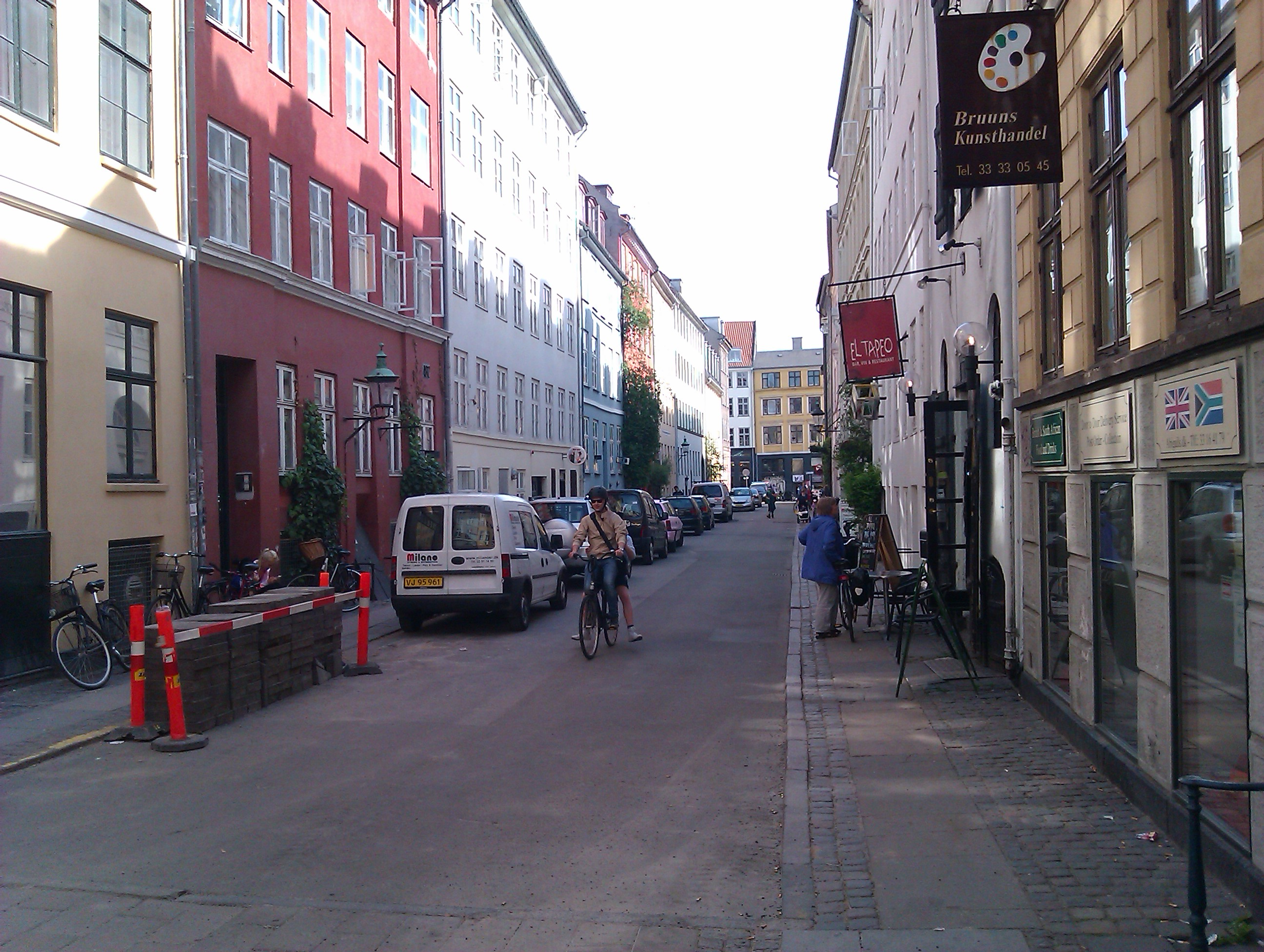 Peder Hvitfeldts Stræde set fra Rosengården, København